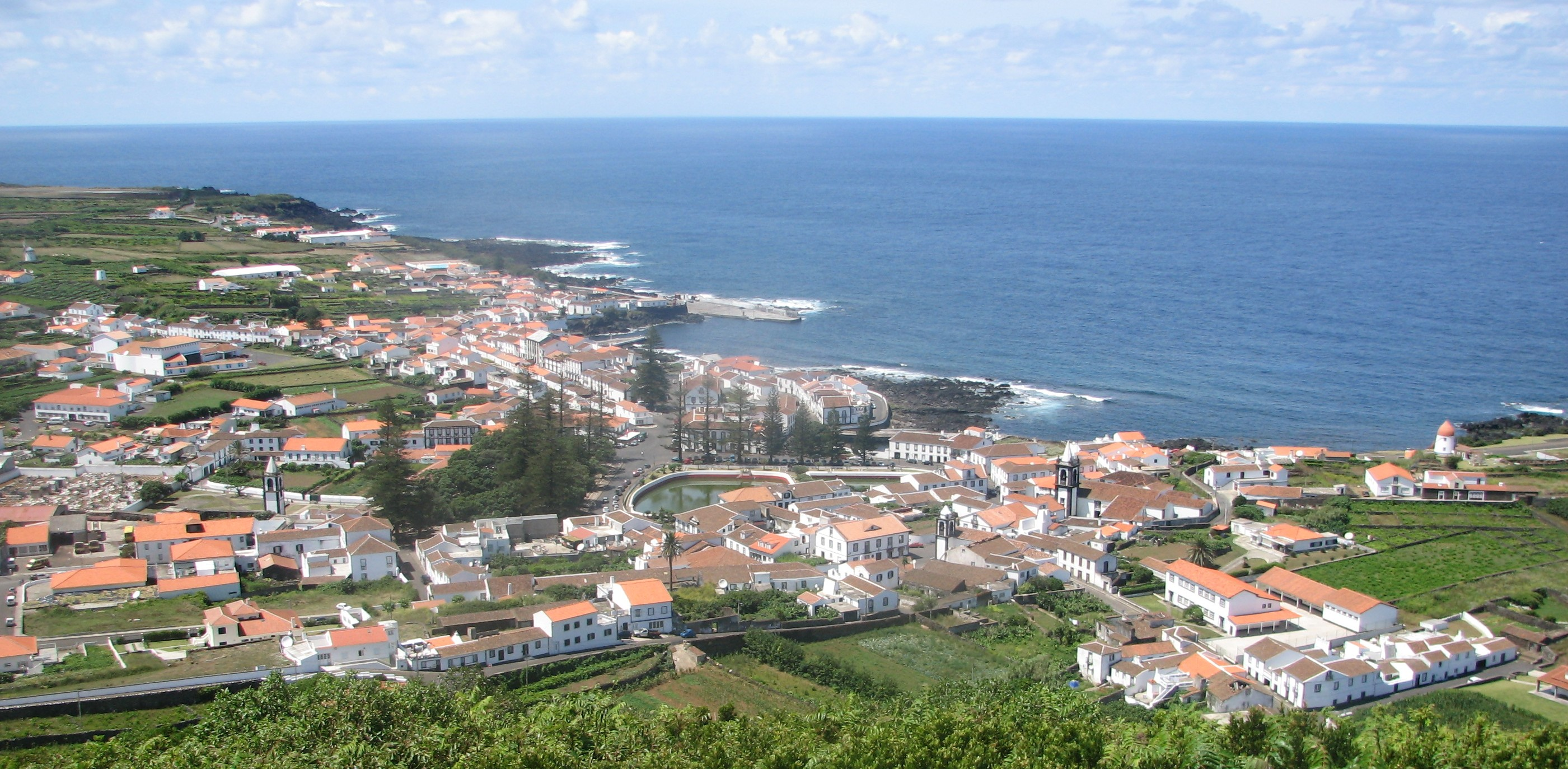 The cenral part of Santa Cruz da Graciosa, Azores.